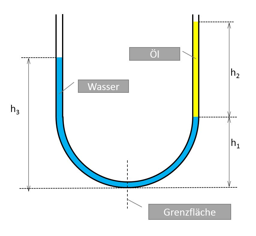 Ölpegel liegt höher als der Wasserpegel